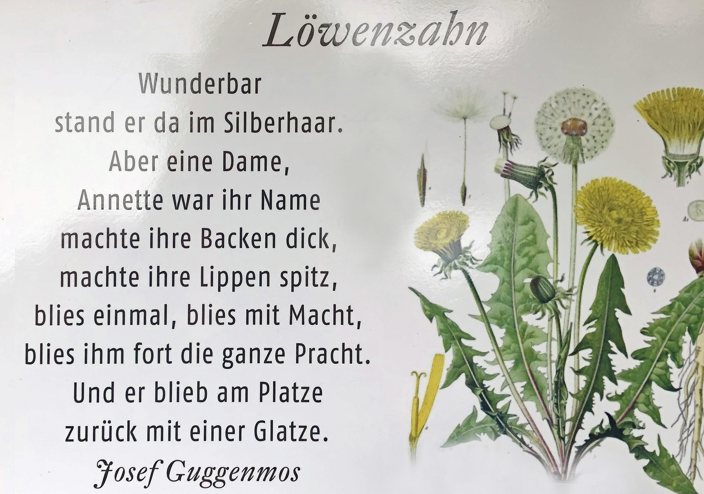 Löwenzahn von Josef Guggenmos im Schaukasten